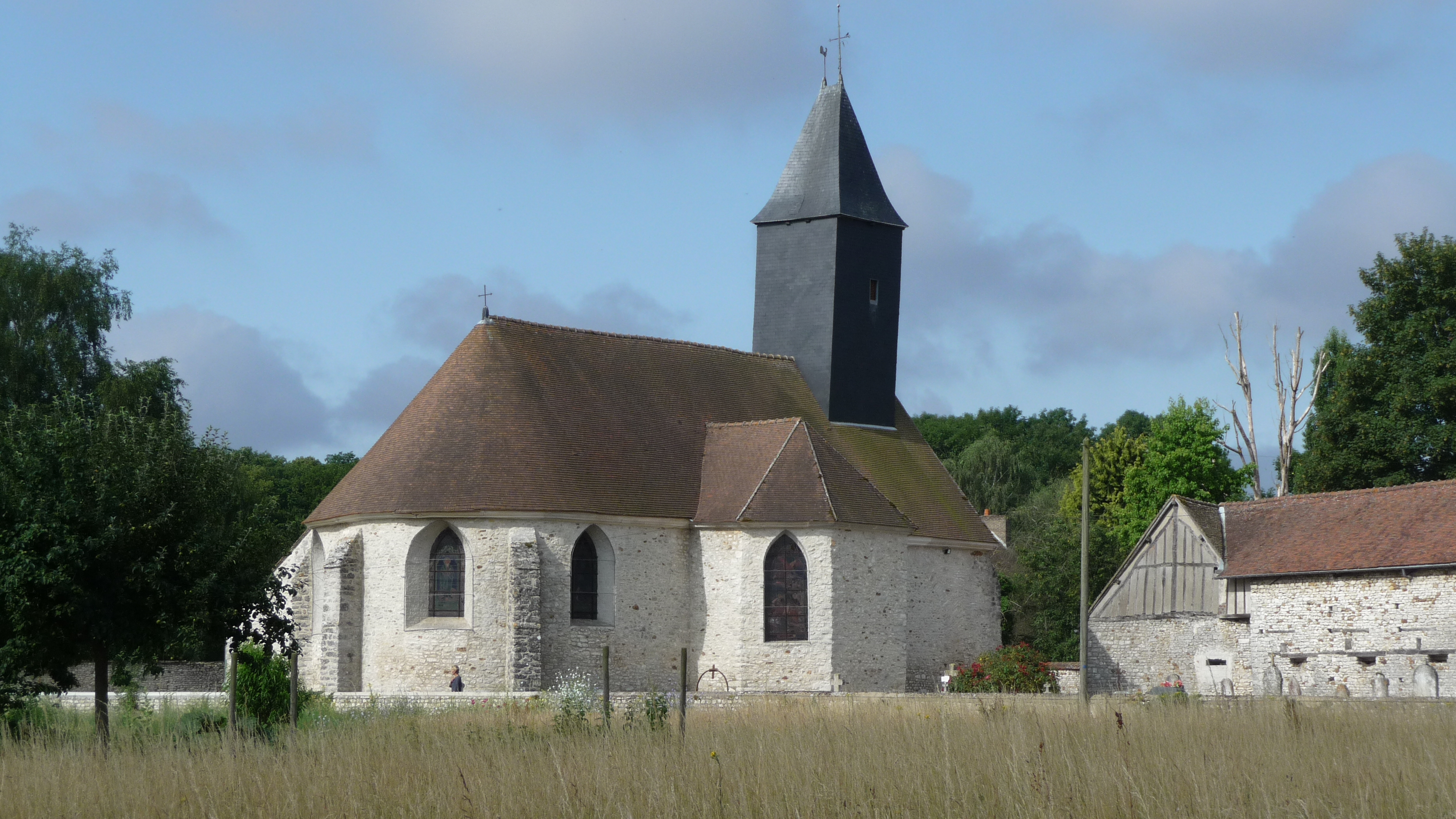 Saint-Illiers-le-Bois (Yvelines, France) - église de la Sainte-Trinité.